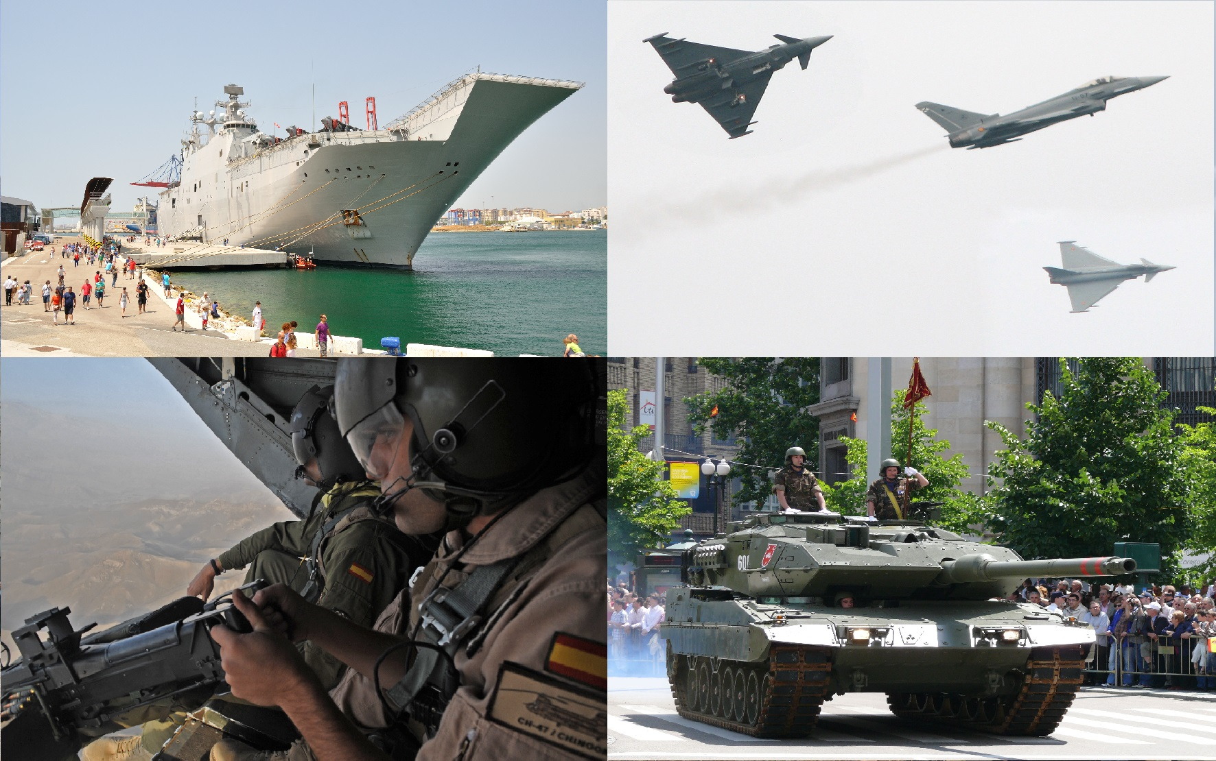 Mural con imágenes de las Fuerzas Armadas Españolas.